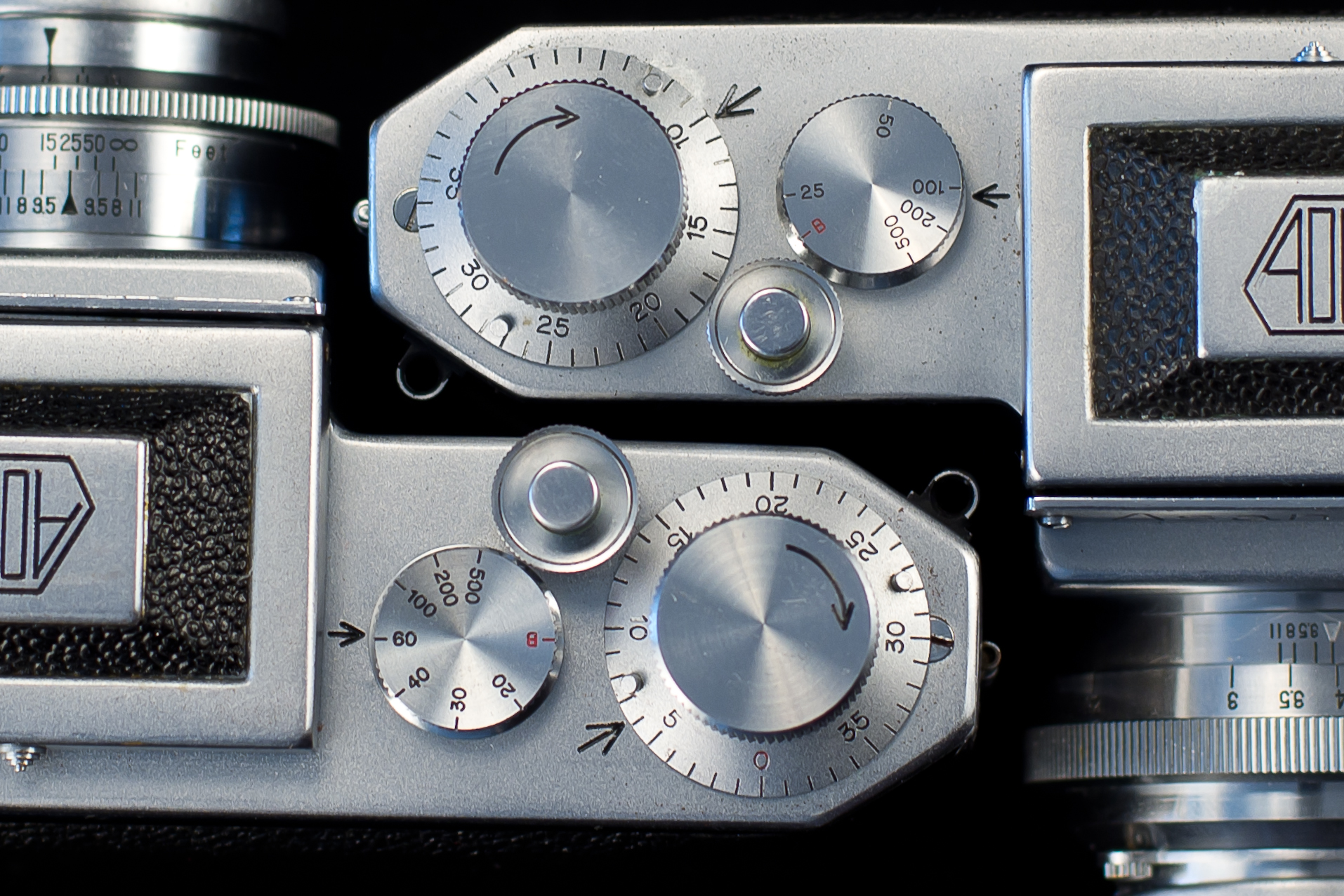 Отличие в головке выдержек фотоаппаратов Asahiflex I и Asahiflex Ia